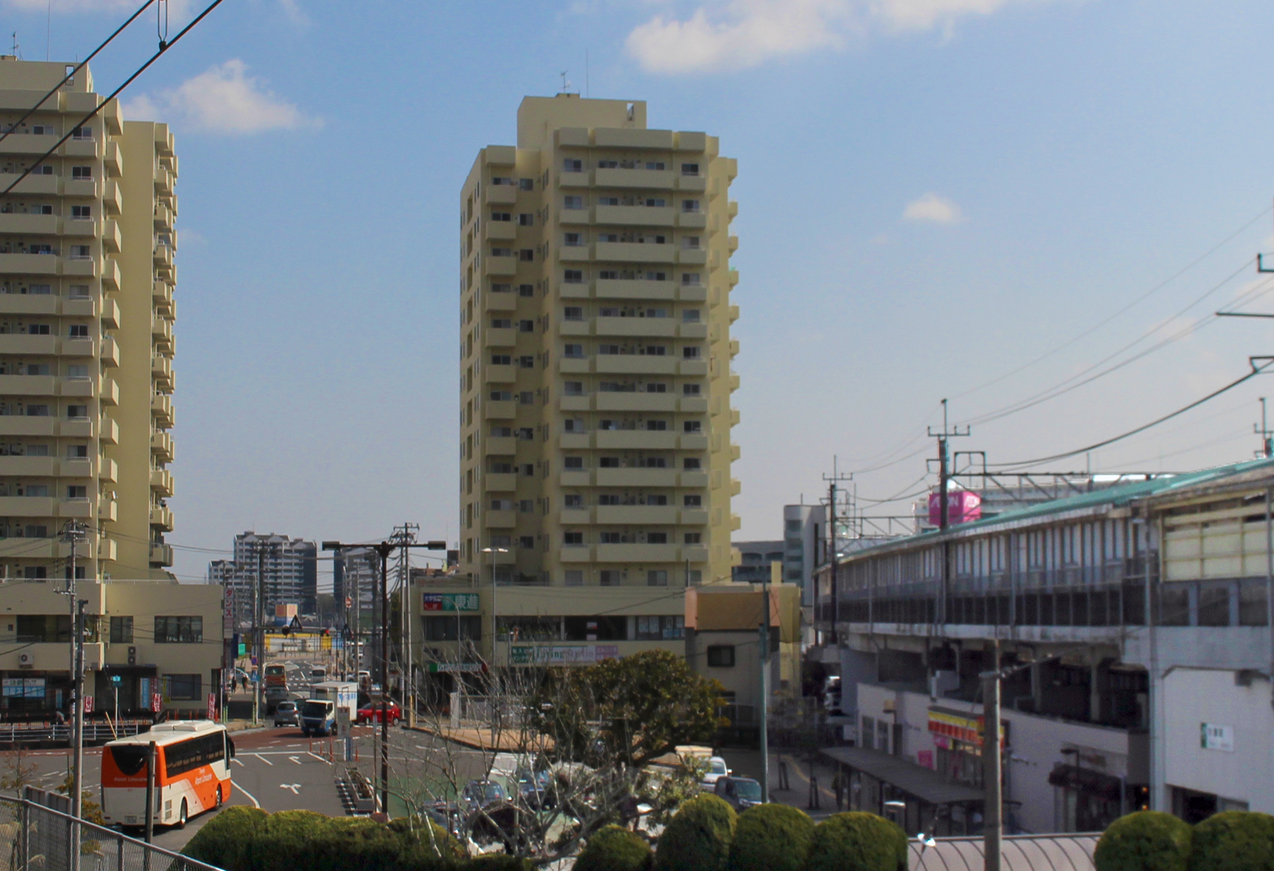 大網駅ロータリー全景（東金線ホームより2019年3月19日撮影）